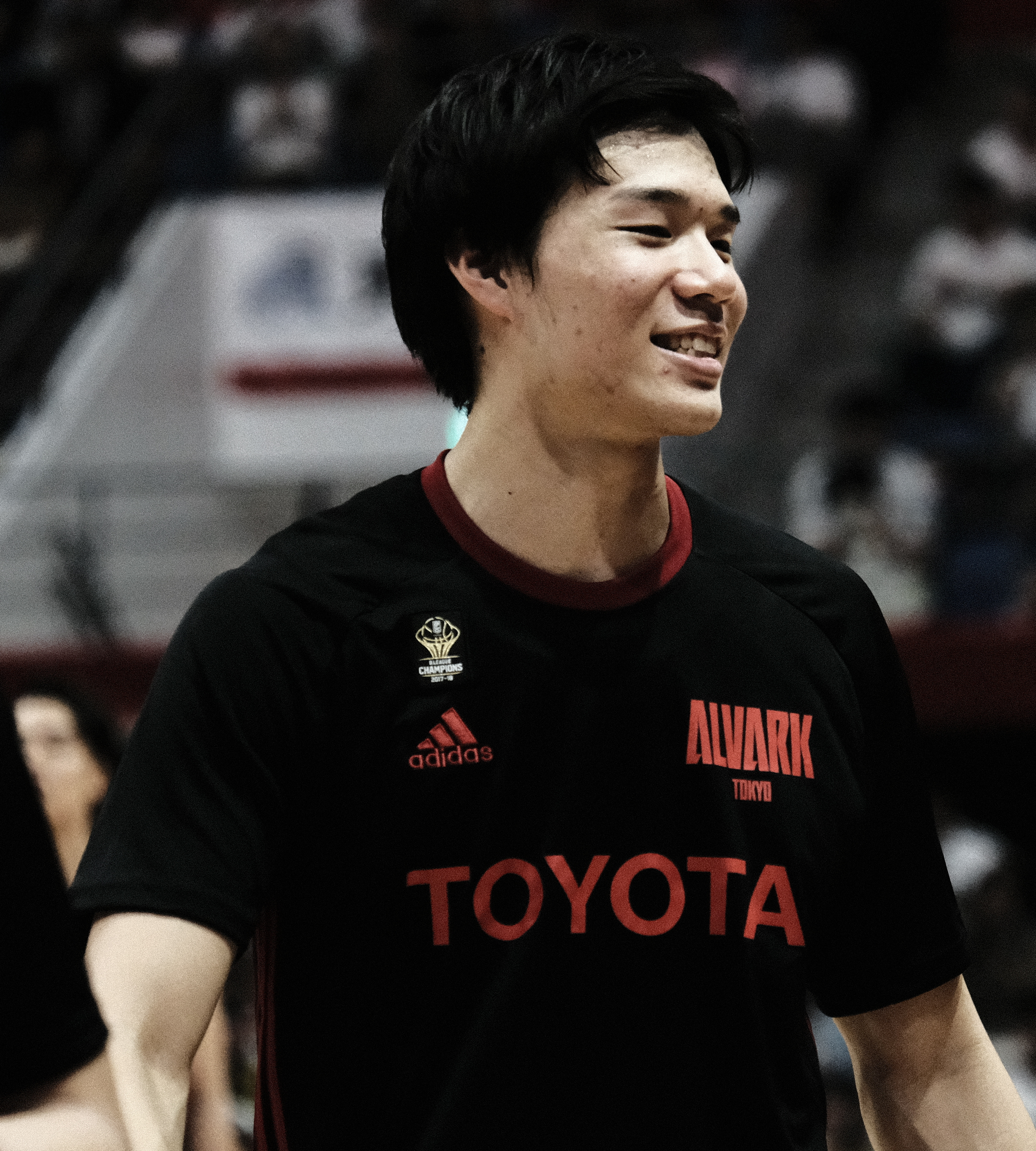 Alvark XF55-200mm